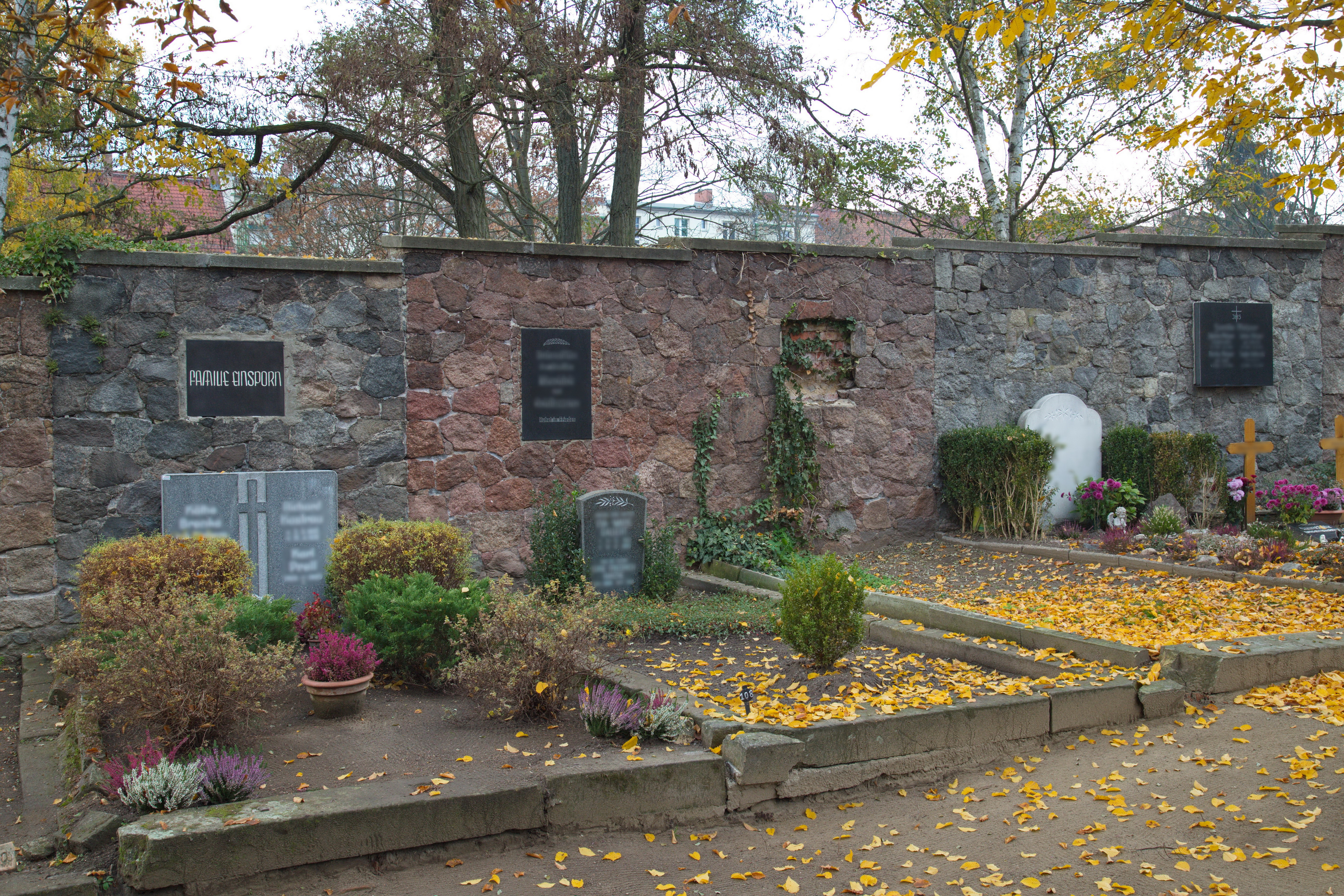 Frankfurt (Oder), Hauptfriedhof, Friedhofsmauer, jede Grabstelle ist mit anders farbigem Naturstein gekennzeichnet. ID-Nr. 09110033